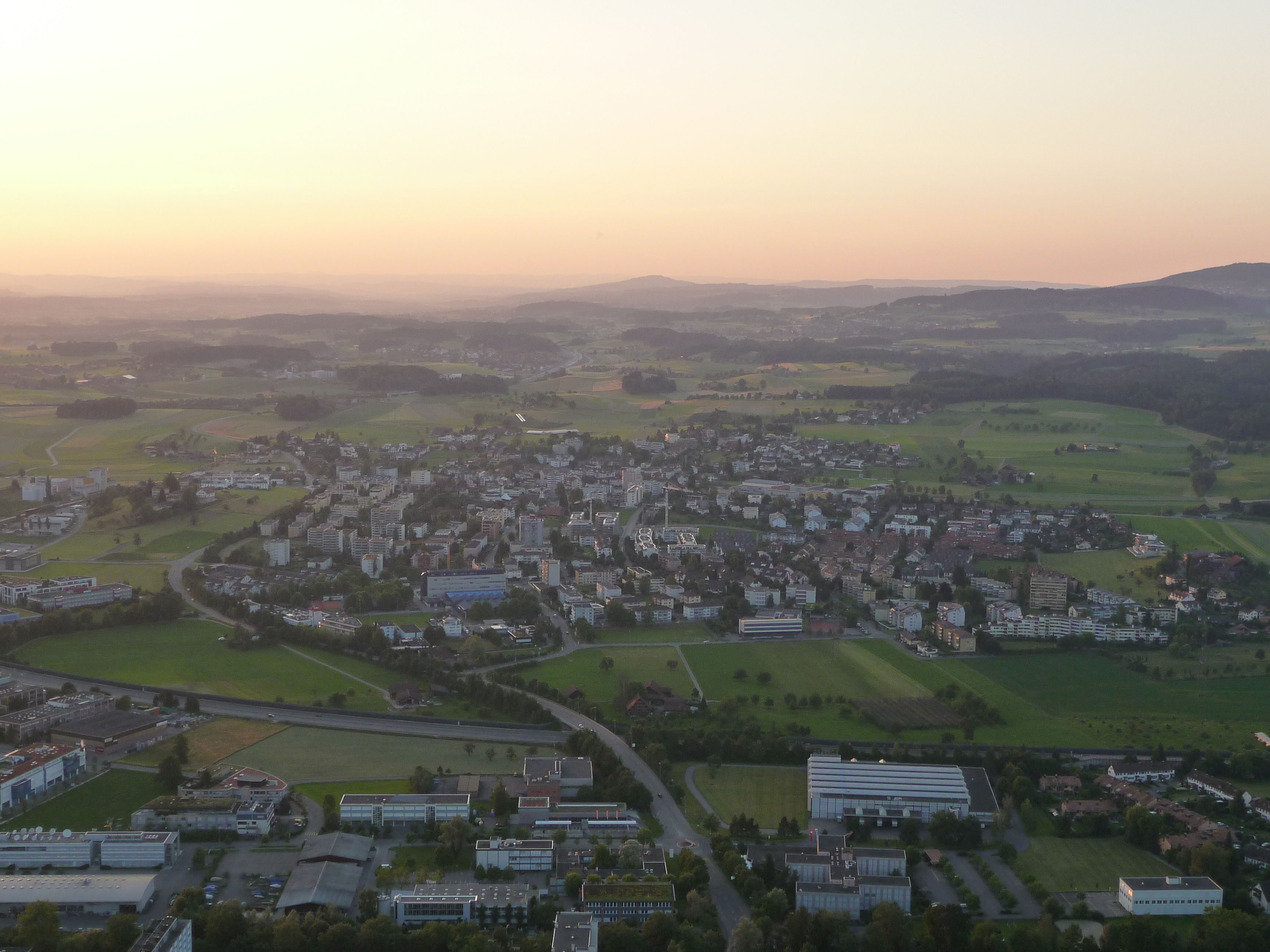 Steinhausen aus der Luft (ca. 350m über Boden)